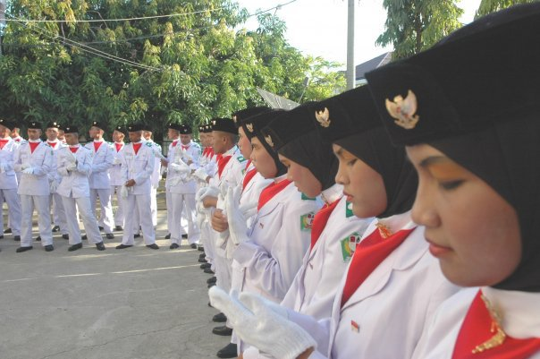 Paskibraka sedang berbaris dan memakai sarung tangan dalam upacara peringatan detik-detik proklamasi di Nanggroe Aceh Darussalam